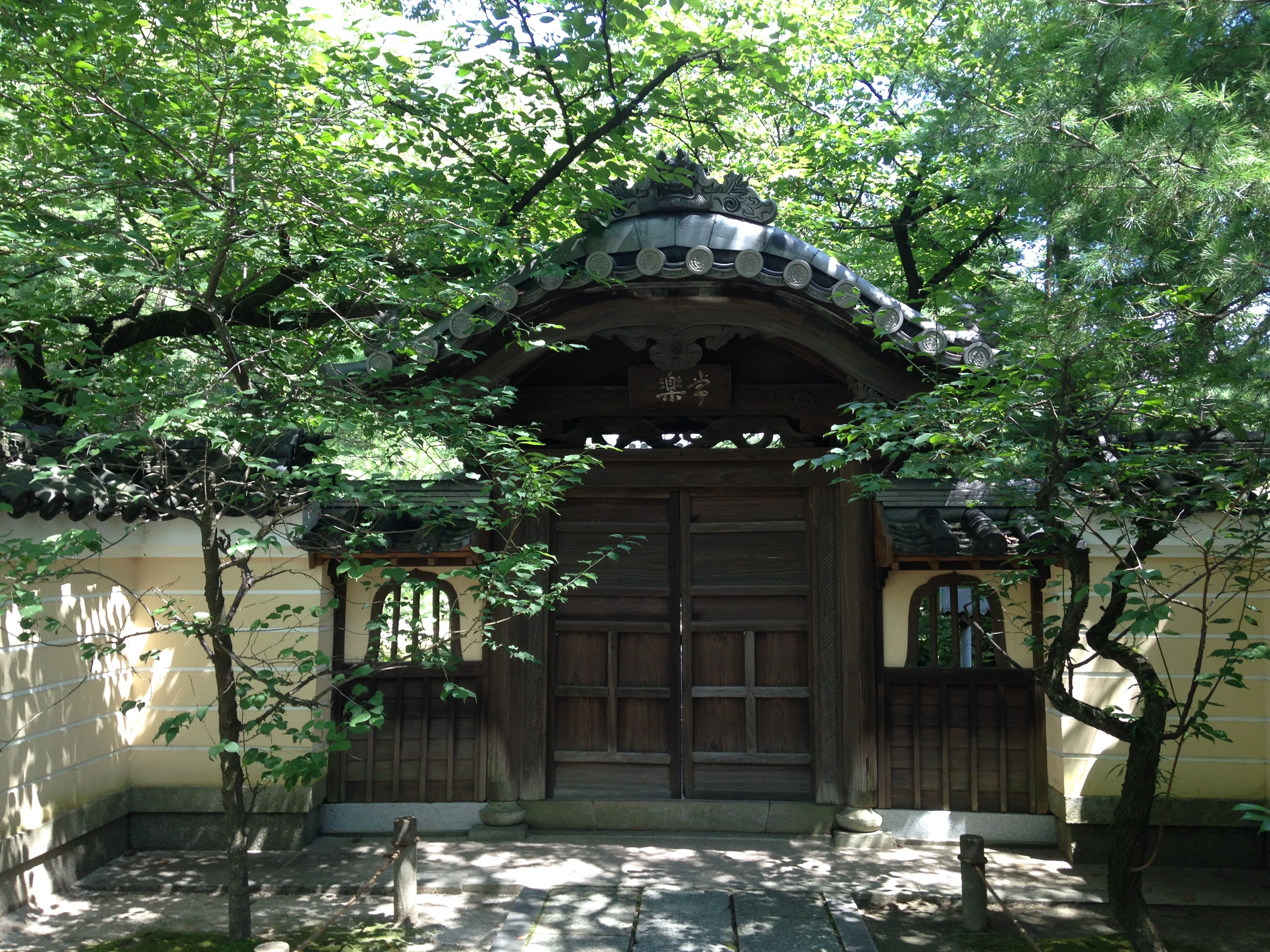 承天寺開山堂(常楽院)の唐門